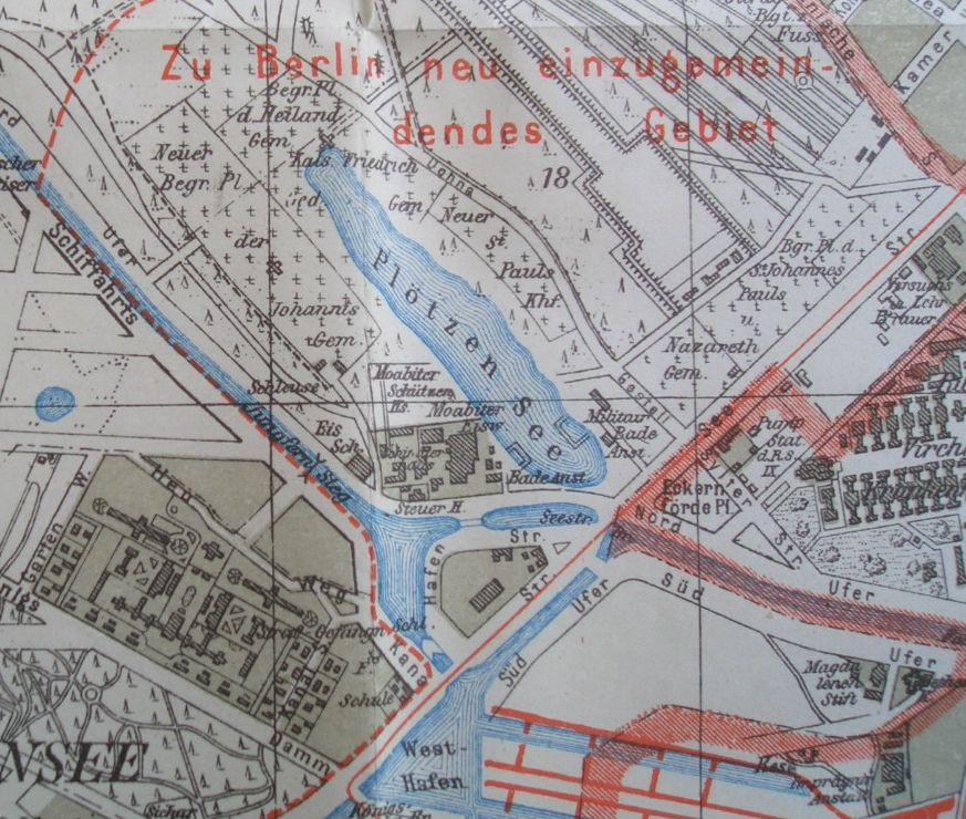 Plötzensee mit den Friedhöfen, einer Militärbadeanstalt, den Moabiter Schützen, dem Gefängnis und dem Westhafen, 1915